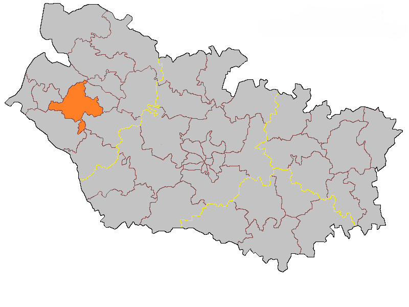 Кантон Муаэнвиль на карте департамента Сомма